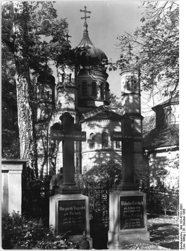 Weimar, griechisch-orthodoxe Kirche, "Neuer Friedhof" Zentralbild Erfurt 26.10.1956 Wittig Das schöne Bild Blick vom historischen Friedhof in Weimar auf die griechisch-orthodoxe Kirche an der Goethe-Schiller-Gruft. Zum Totensonntag.